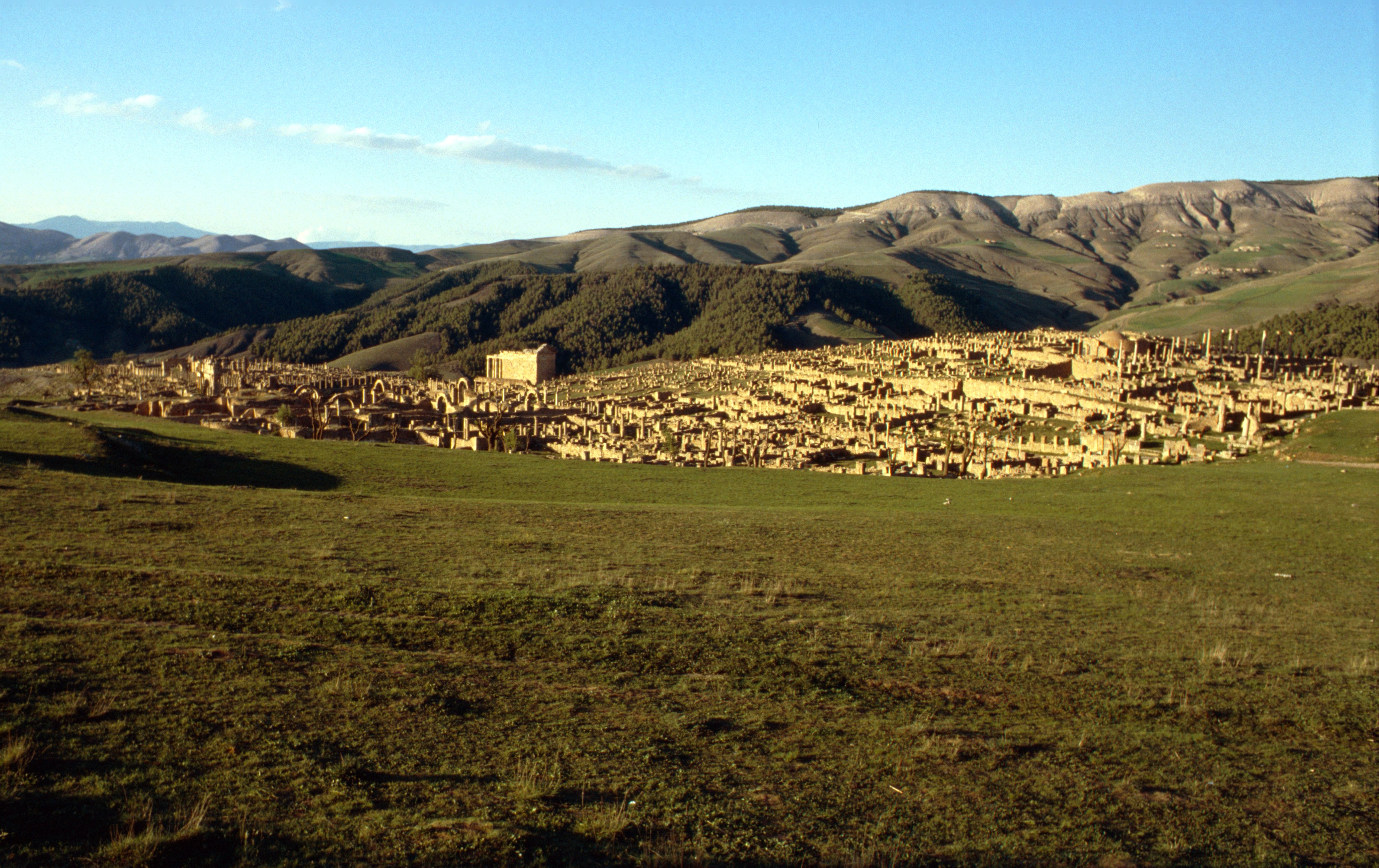 Blick auf Djémila 1990